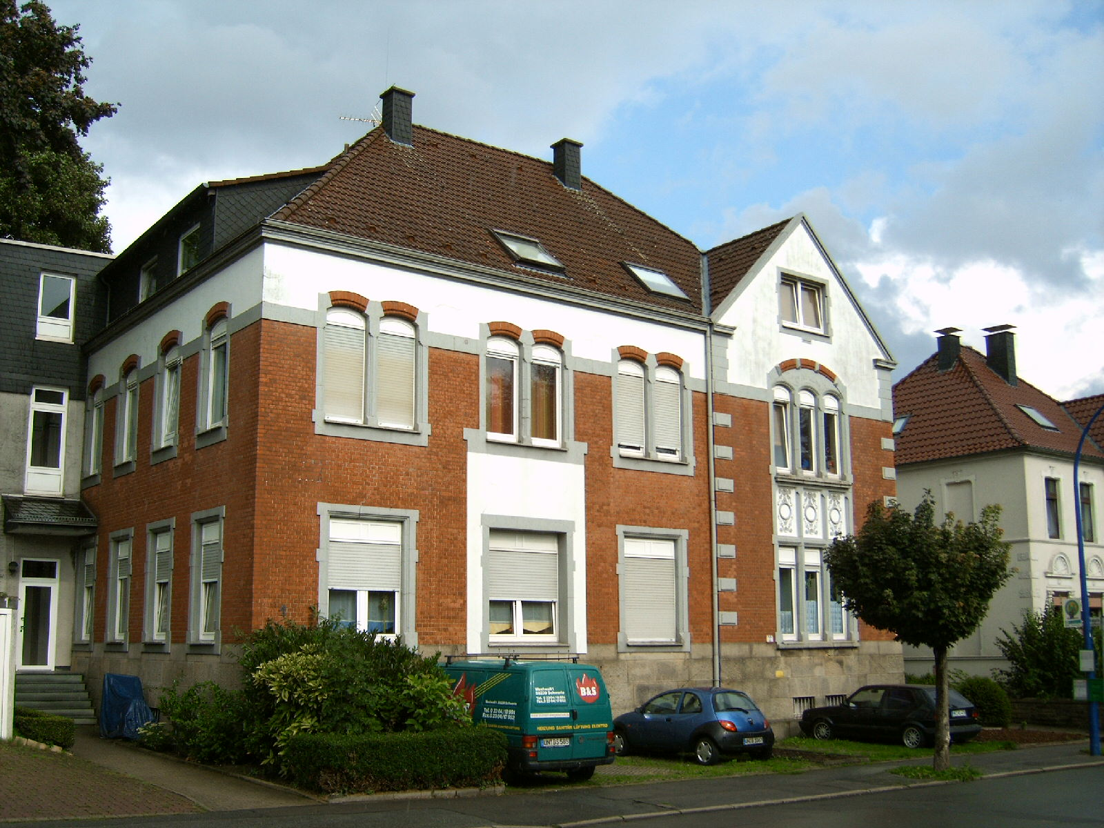 Amthaus Westhofen (bis 1975), Schwerte, Deutschland